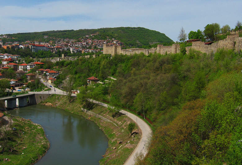 р.Янтра с изглед към Царевец